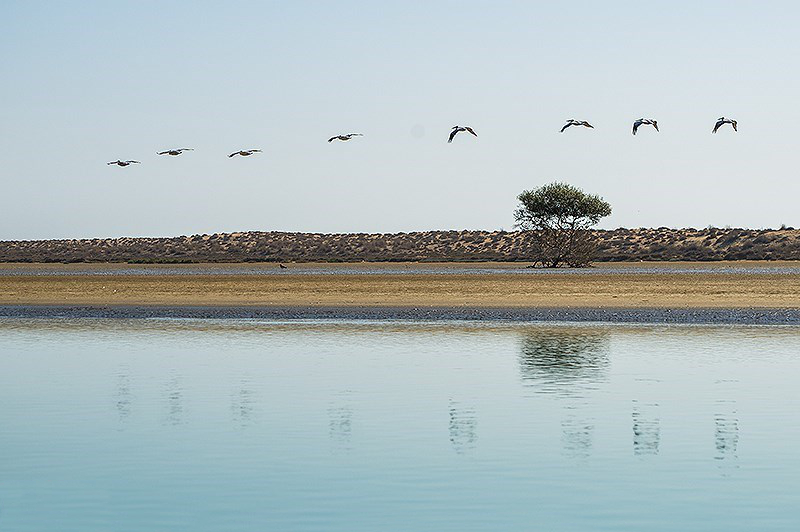 بندر تنگ سیستان و بلوچستان بندر تنگ بخش کوچکی است در شهر چابهار که به دلیل تلاقی کویر و دریا در این منطقه جذابیت های ویژه ای به وجود آمده که جلوه ی بی نظیری را به این روستا بخشیده است. شهرستان کنارک که در جنوب شرقی ایران و در سواحل زیبای دریای عمان قرار گرفته است، از دیرباز با اسکله صیادی بزرگ و فعالش یاد می‌شود. جاذبه های طبیعی بکر و بی نظیری در این بخش کوچک بندری وجود دارد دل هر گردشگری را می برد.سواحل شنی و ماسه ای و صخره ای وجود درخت انجیر معابد و تپه های گل افشان از جاذبه های این بندر بی نظیر است.